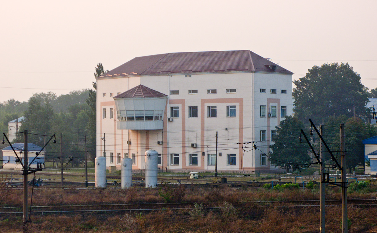 Станция Ясиноватая.